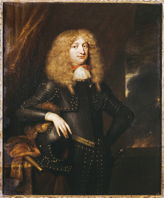 Portret van mogelijk Walraad van Nassau -Usingen